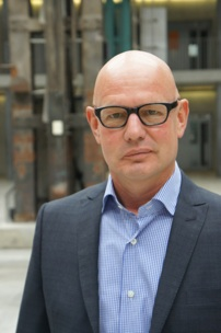 Thomas Garms, Zürich